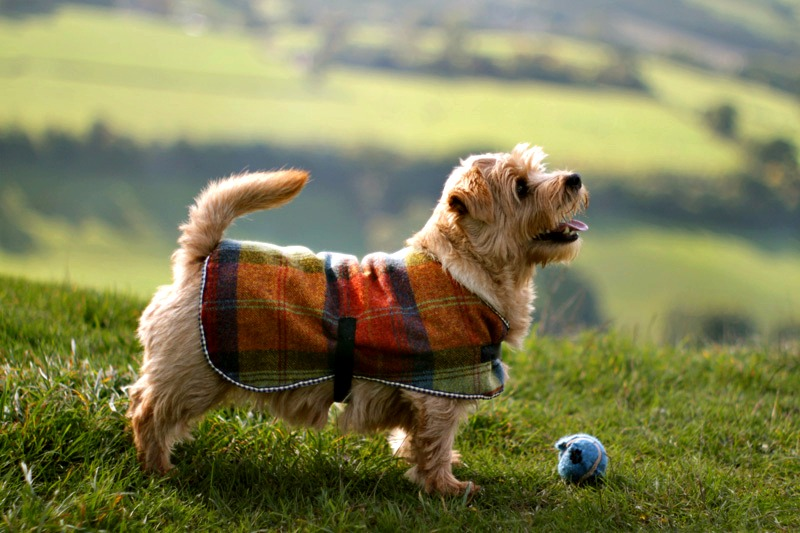 Norfolk Terrier